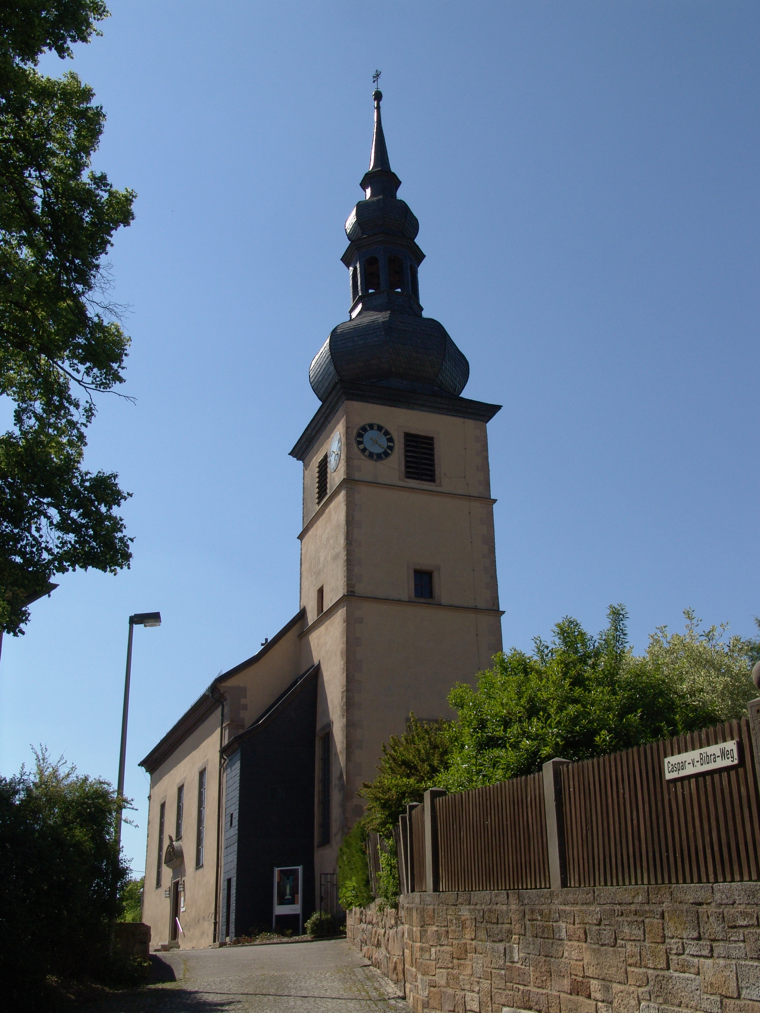 evang.-luth. Kirche in Höchheim